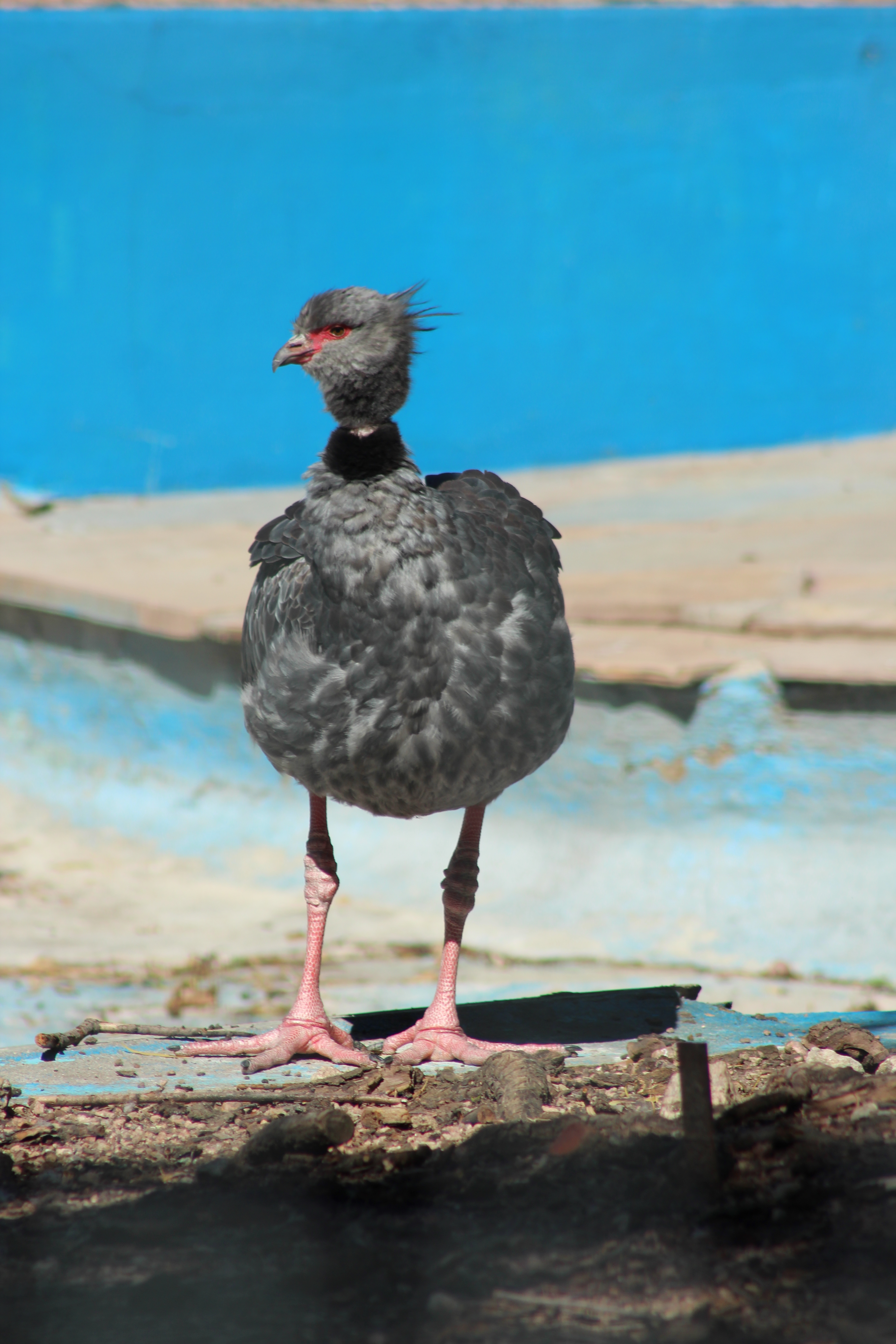 Chajá. Familia Anhimidae